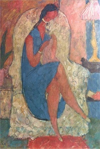 Het raadsel vrouw, Olie op doek 120x100, geschilderd 1964. De vrouw stelt Jos Hagemeijer voor, maar heeft geen gezicht gekregen.